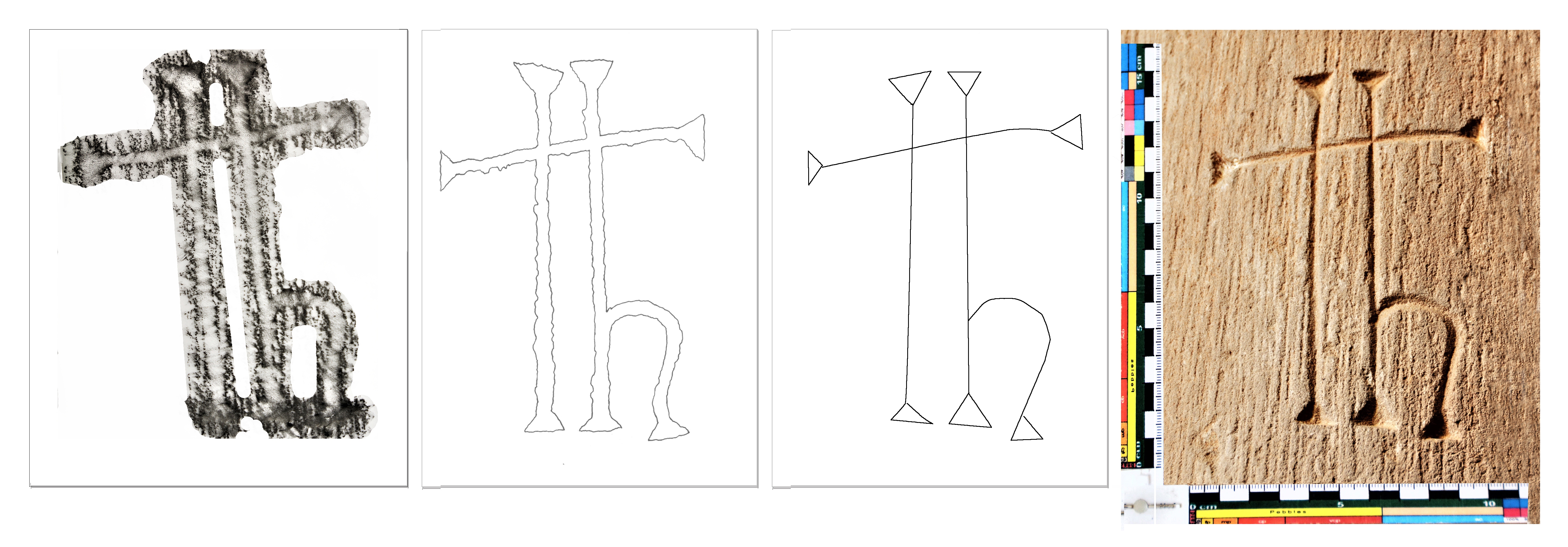 Captura de marca de cantero de transición al gótico.